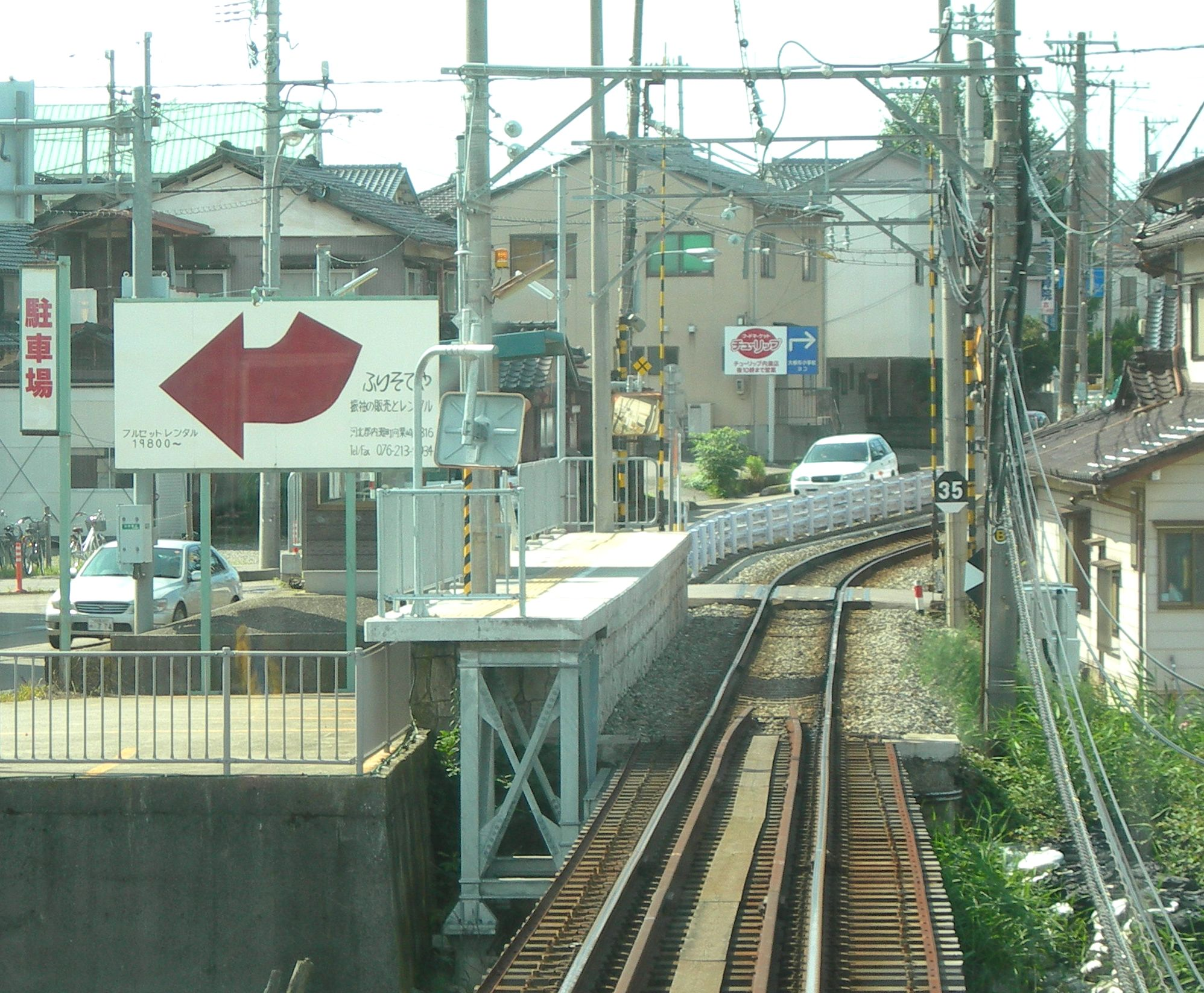 北陸鉄道・粟ヶ崎駅 ホーム